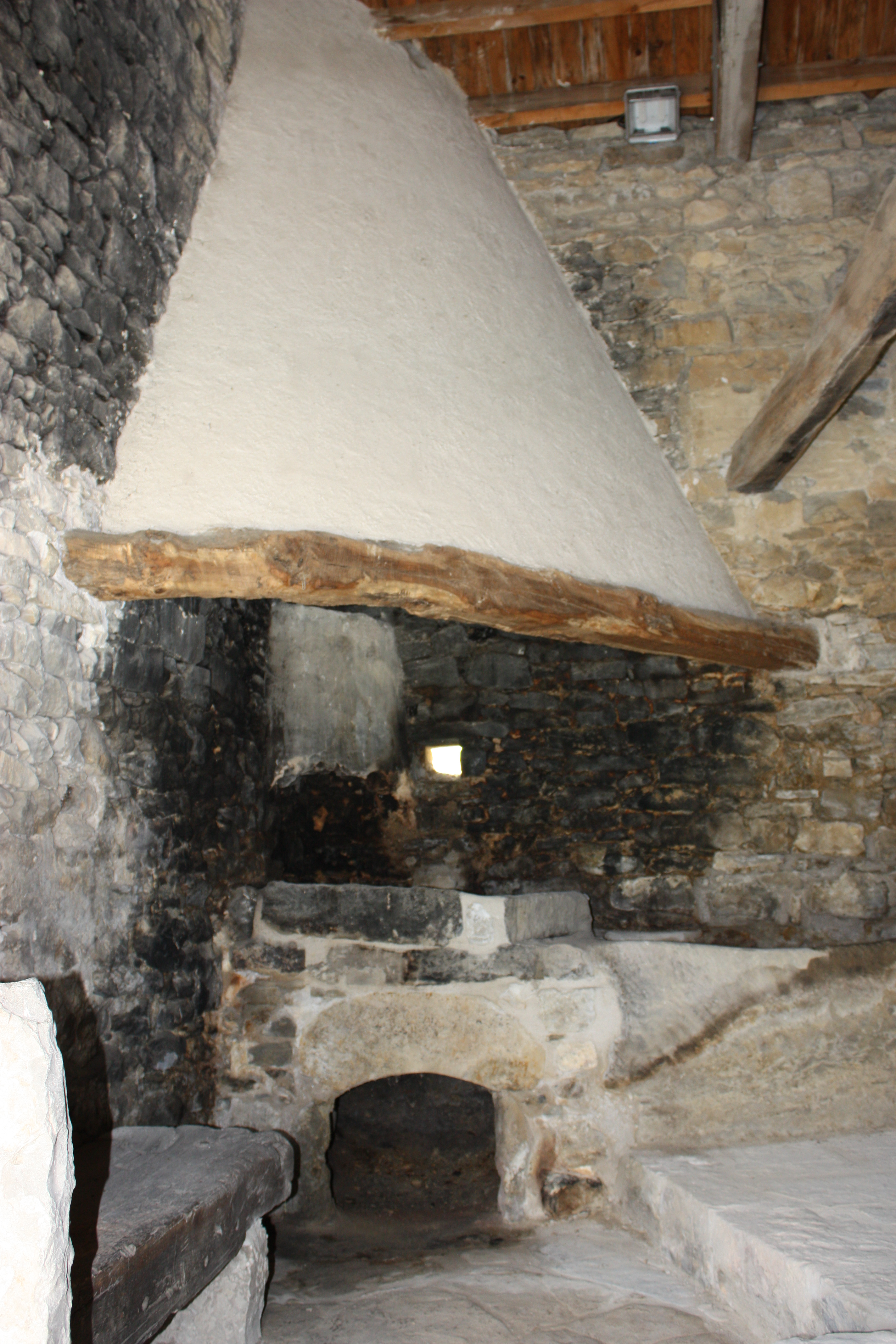 Herreria de Almazorre, Comarca de Sobrarbe (Huesca)